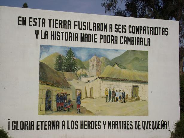 Mural en las afueras del pueblo de Quequeña, Arequipa